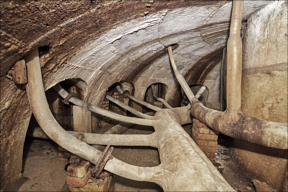 Une partie de l'araignée sous la fontaine Latone, dans les Jardins du Château de Versailles.